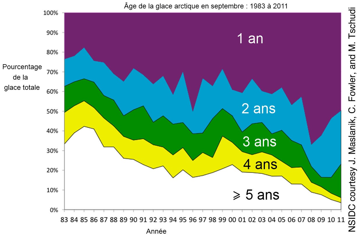 Âge de la glace arctique en septembre pour chaque année de 1983 à 2011.